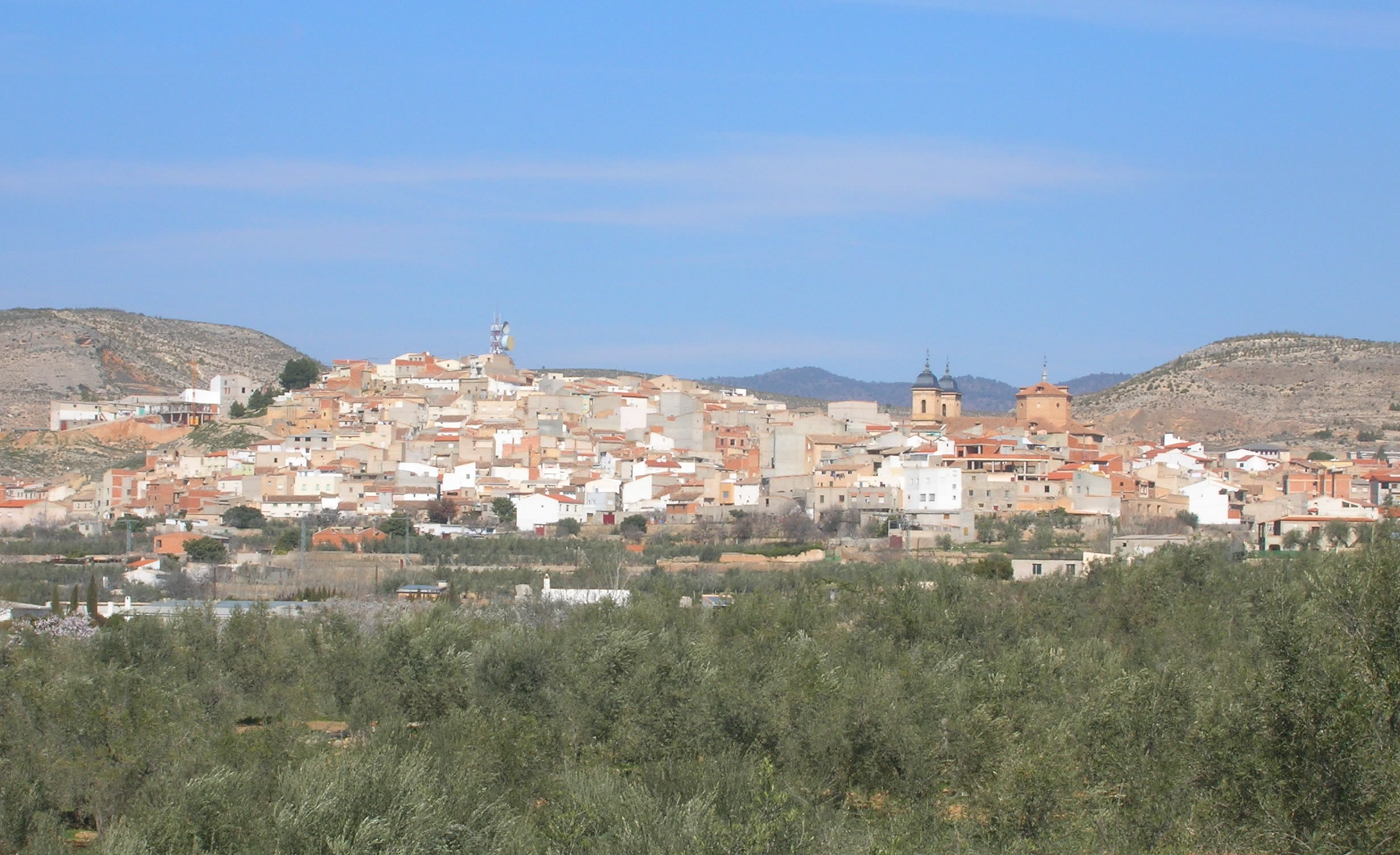 Elche de la Sierra, Albacete, Castilla-La Mancha, España, desde la carretera de Férez, Socovos y Murcia.